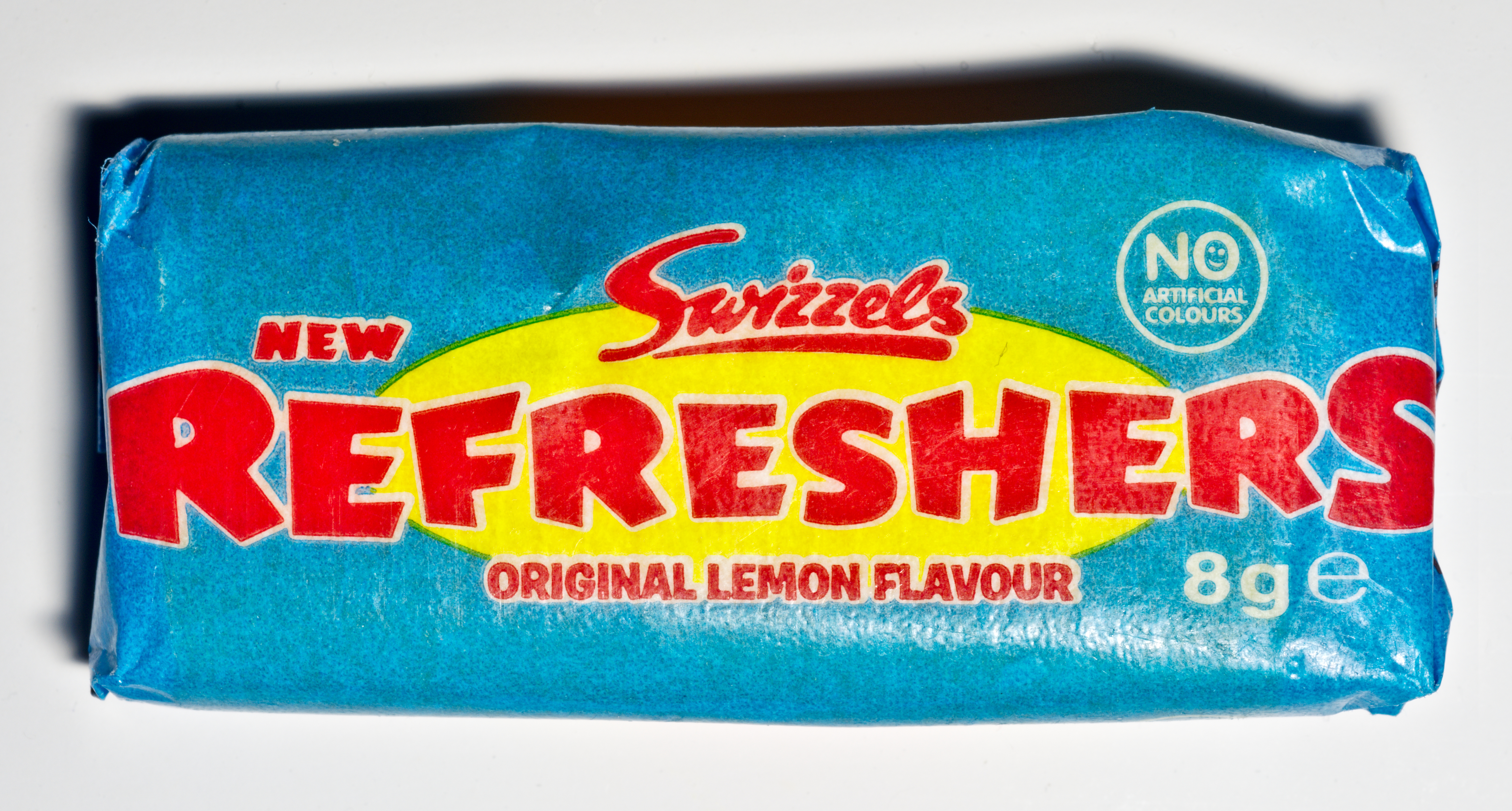 Refreshers